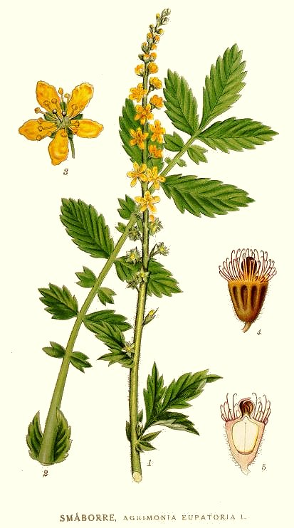 Agrimonia eupatoria L. Original Description Småborre, Agrimonia eupatoria L.